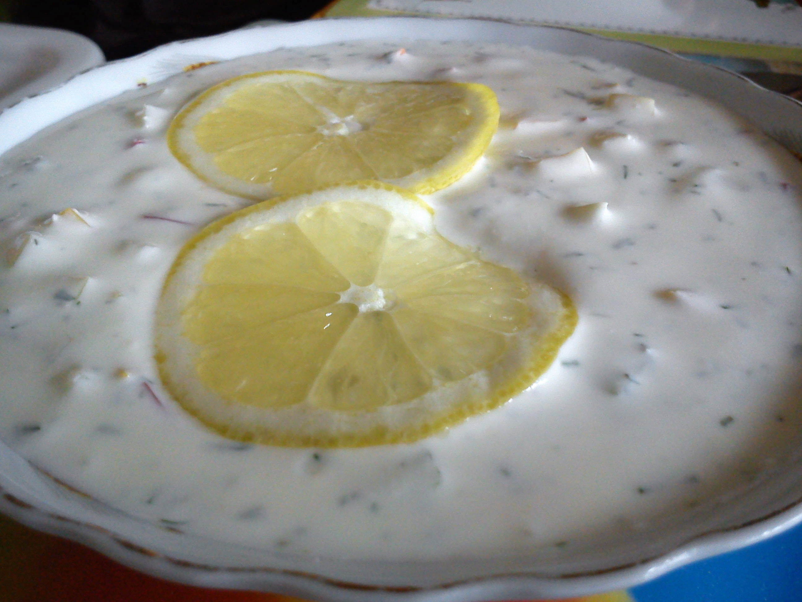 Polski chłodnik na jogurcie.